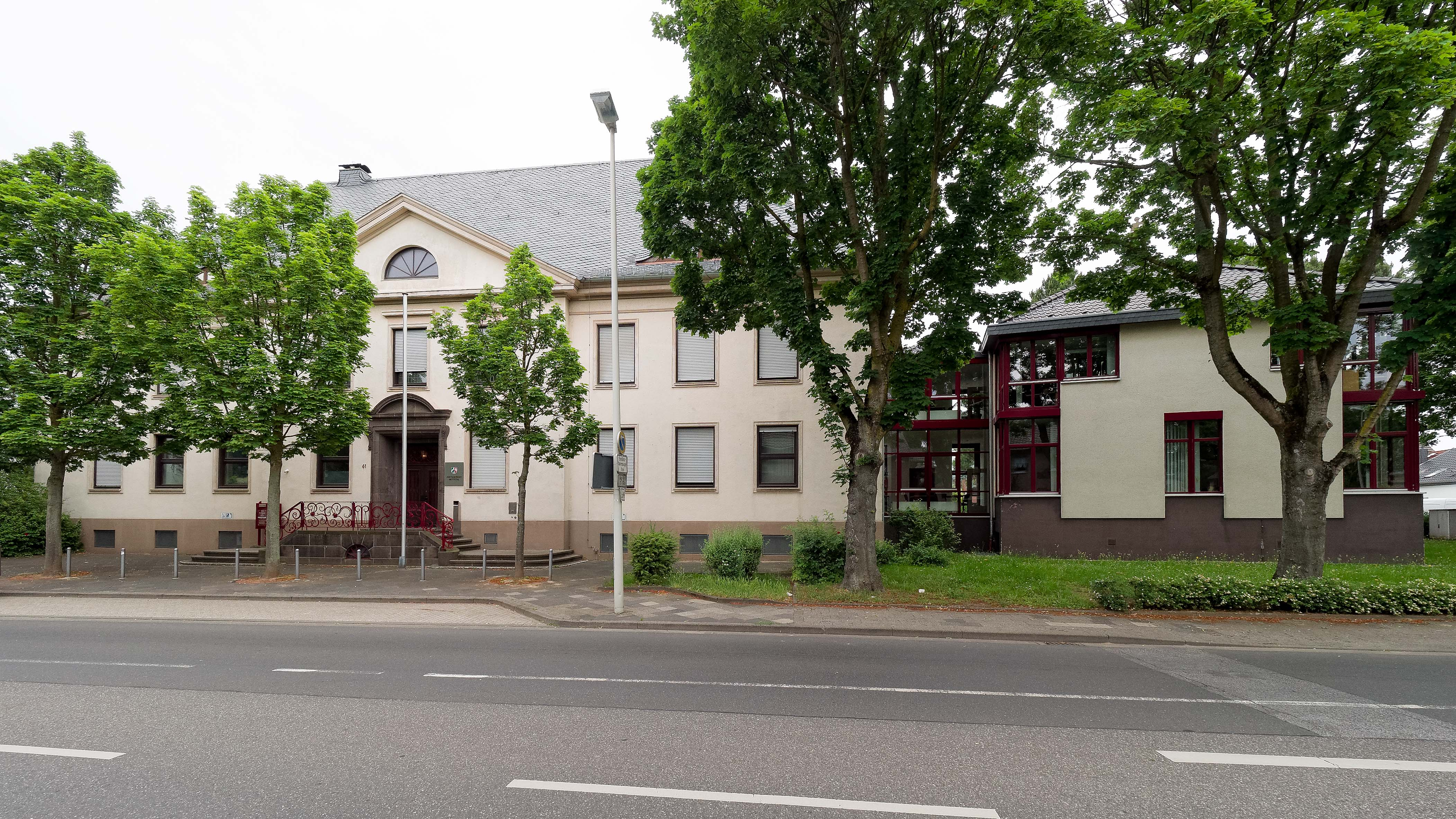 Amtsgericht Nettetal, Steegerstraße 61, 41334 Nettetal